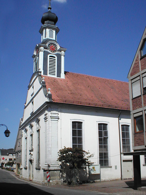 Evang. Stadtkirche in Adelsheim